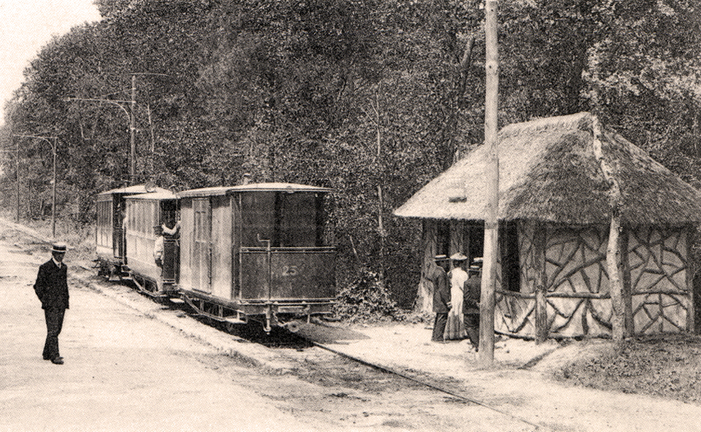 Tramway d'Etaples à Paris-Plage en forêt du Touquet